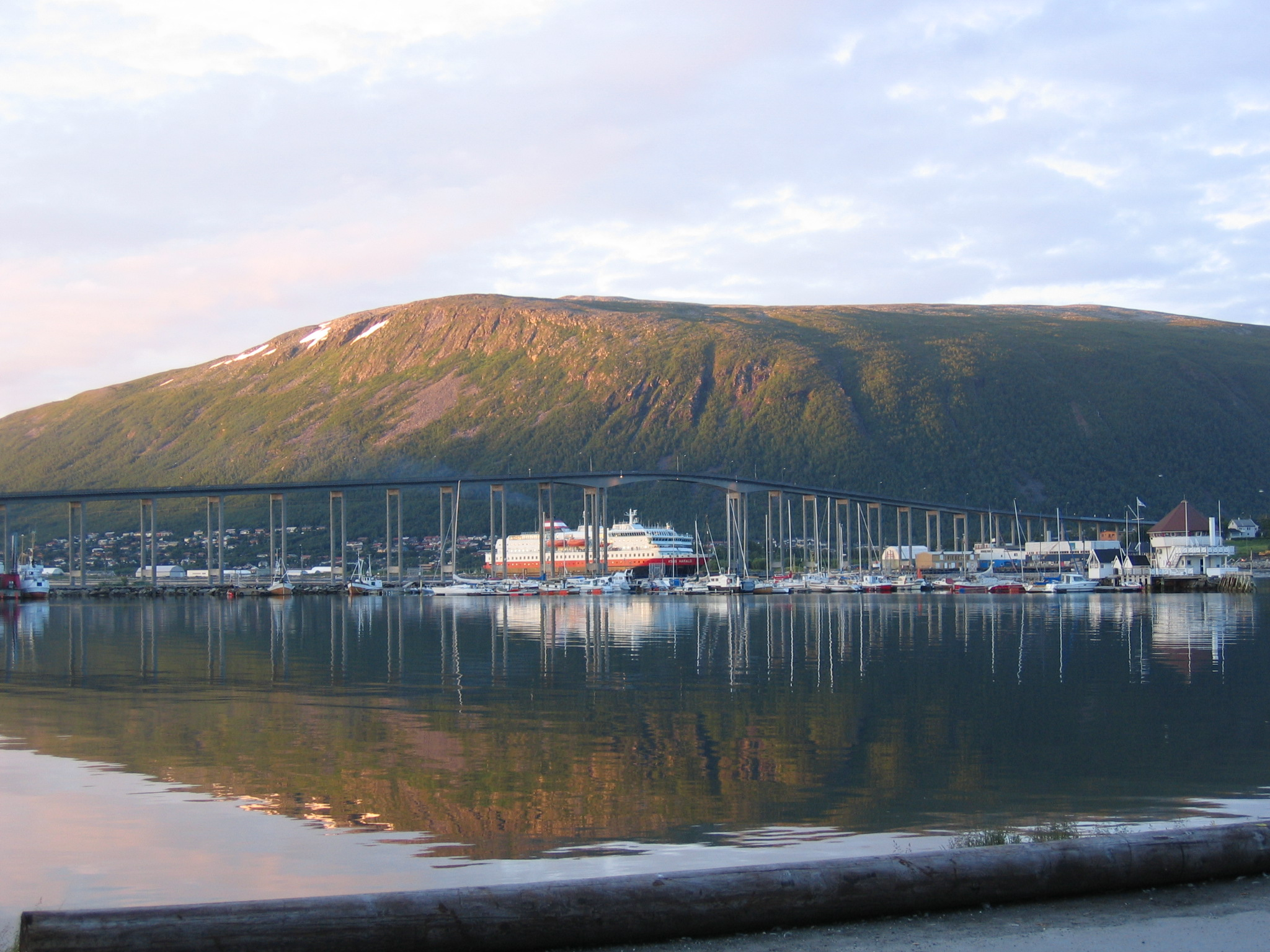 Tromsøbrua med hurtigruteskipet Kong Harald